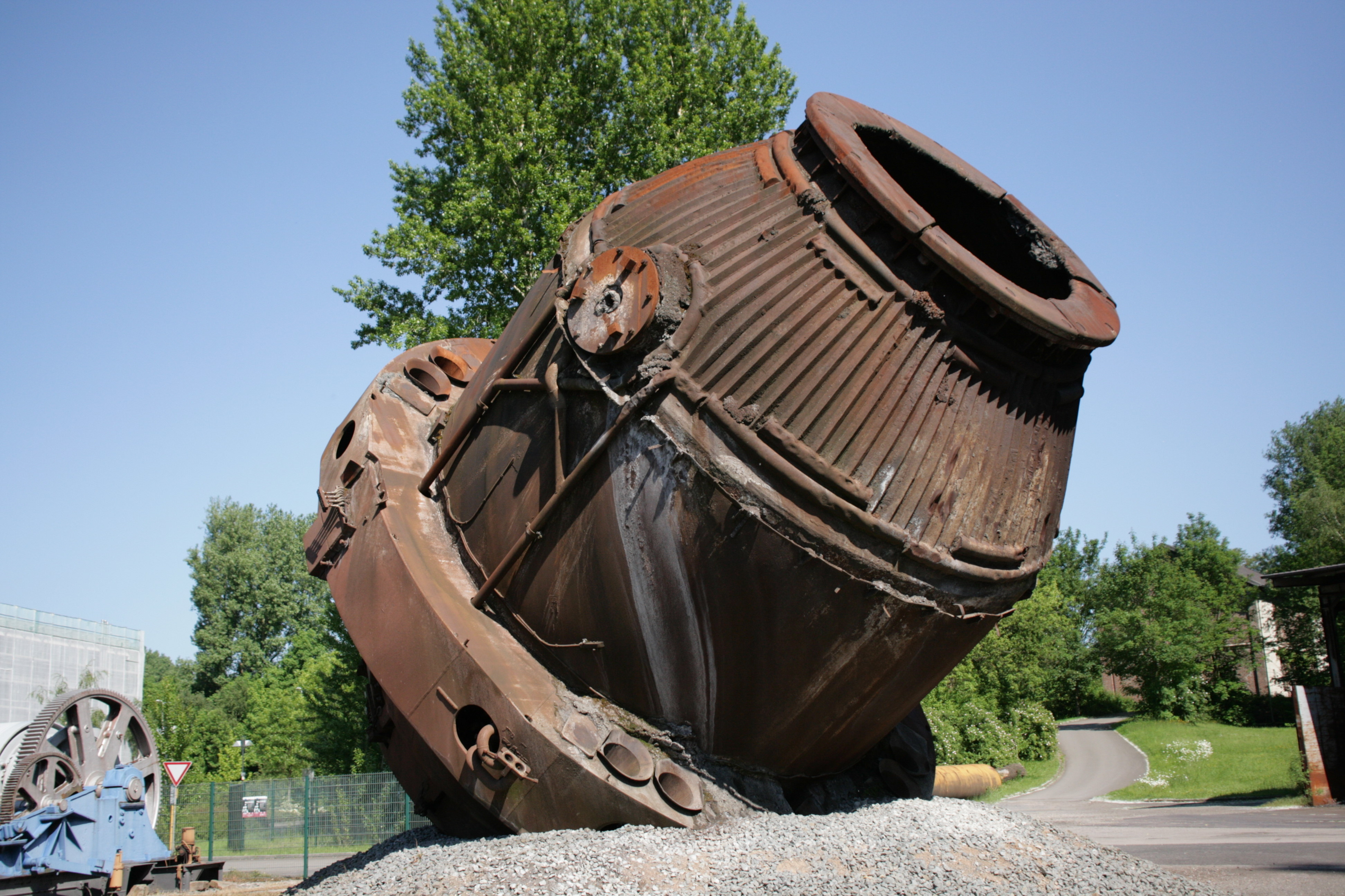 Ehemaliger Schrottplatz der Henrichshütte in Hattingen